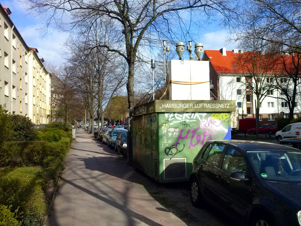 Luftmessstation Habichtstraße in Hamburg-Barmbek-Nord